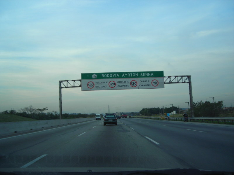 Trecho inicial da Rodovia Ayrton Senna (SP-70) no sentido capital-interior, na saída de São Paulo.